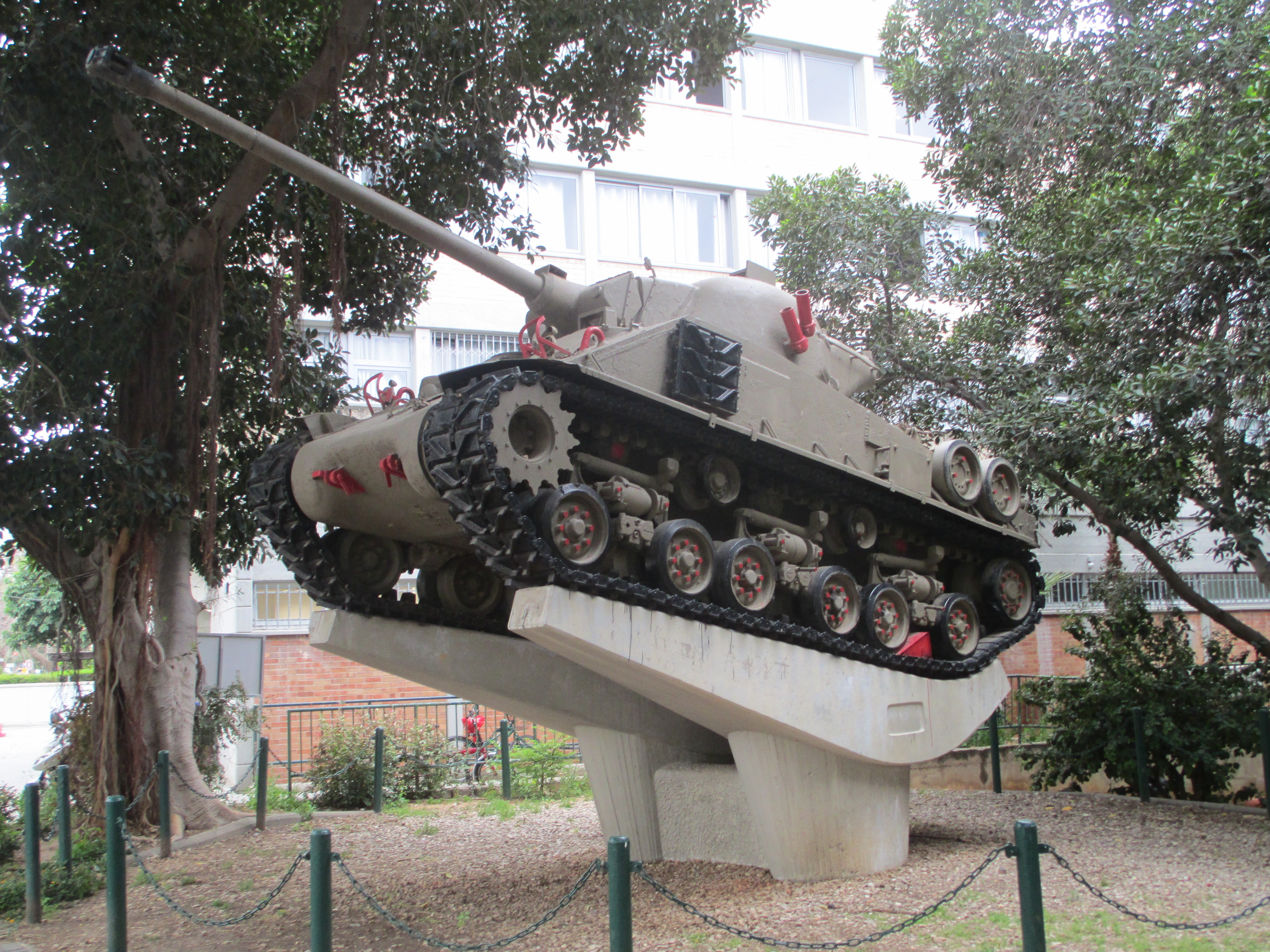 Sherman M50 with 75 french gun from AMX 13 tank